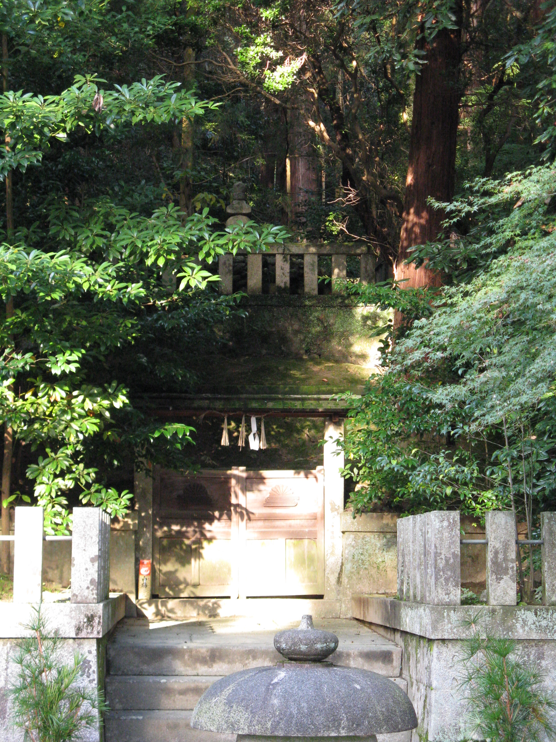 観心寺 楠木正成首塚